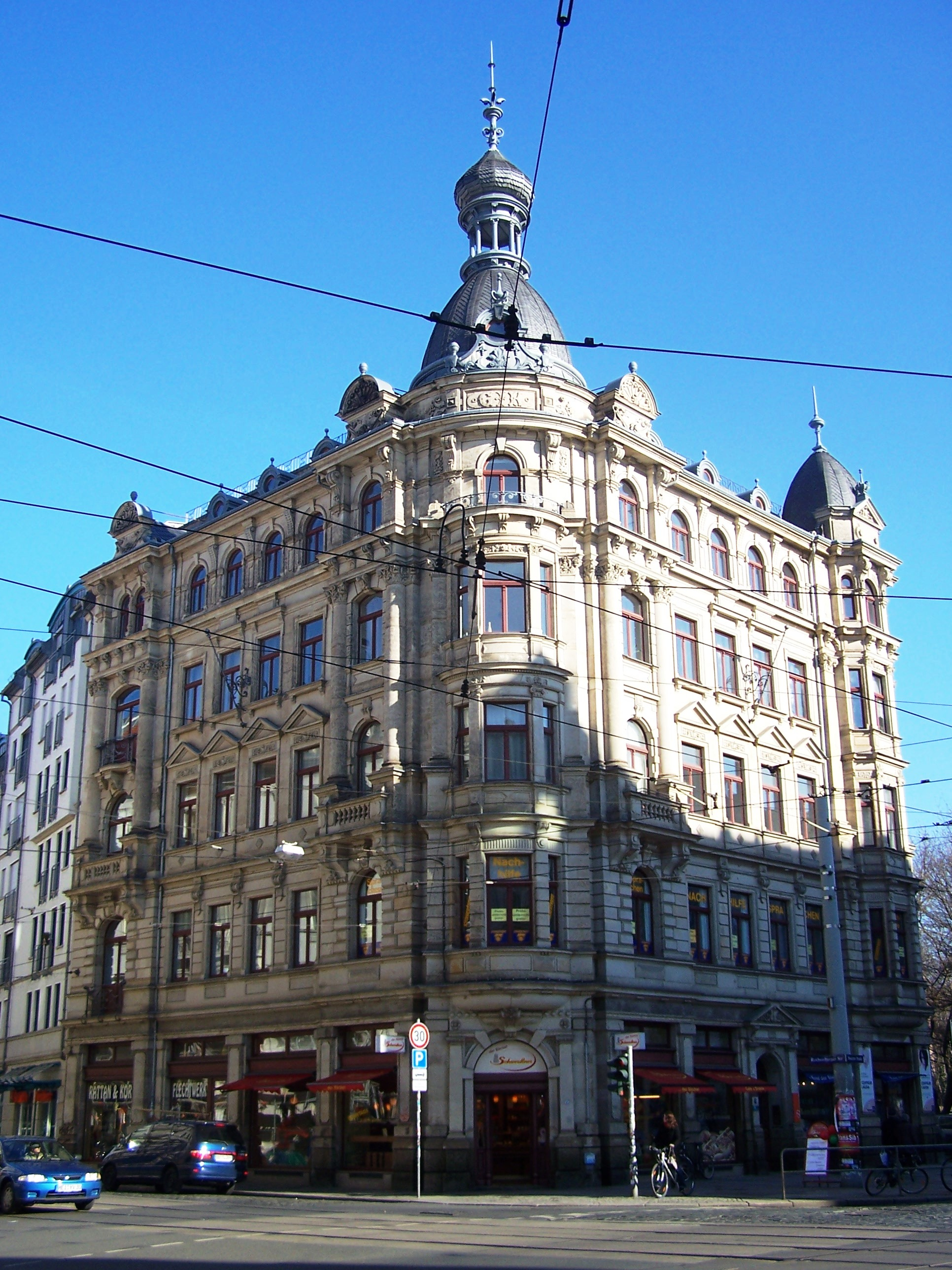 Markantes Eckhaus Bautzner Str./ Ecke Rothenburger Straße in der Äußeren Neustadt in Dresden, Haus Bautzner Straße 27b ist denkmalgeschützt